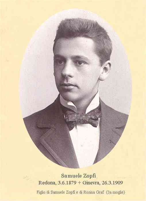 Samuele Zopfi (IV), figlio di Samuele (1828-1888) e della terza moglie Rosina Graf, morto a Ginevra in un incidente d'auto venerdì 26.3.1909